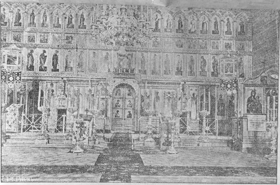 Внутренний вид храма Сергия Радонежского на Ходынском поле.